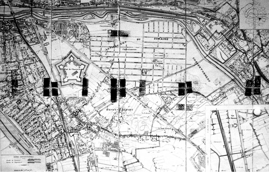 Plan cadastral de la ville de Maisons-Alfort à la fin du 19e siècle, avec le domaine de Charentonneau découpé en parcelles de lotissements.